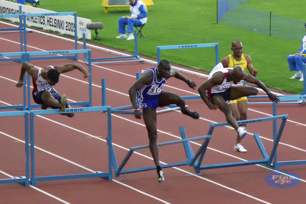 Terrence Trammell, USA, Ladji Doucouré, FRA, Allen Johnson, USA, Maurice Wignall, JAM, 110m hurdles World championships Helsinki 2005. Mise en ligne le 6 juillet 2007